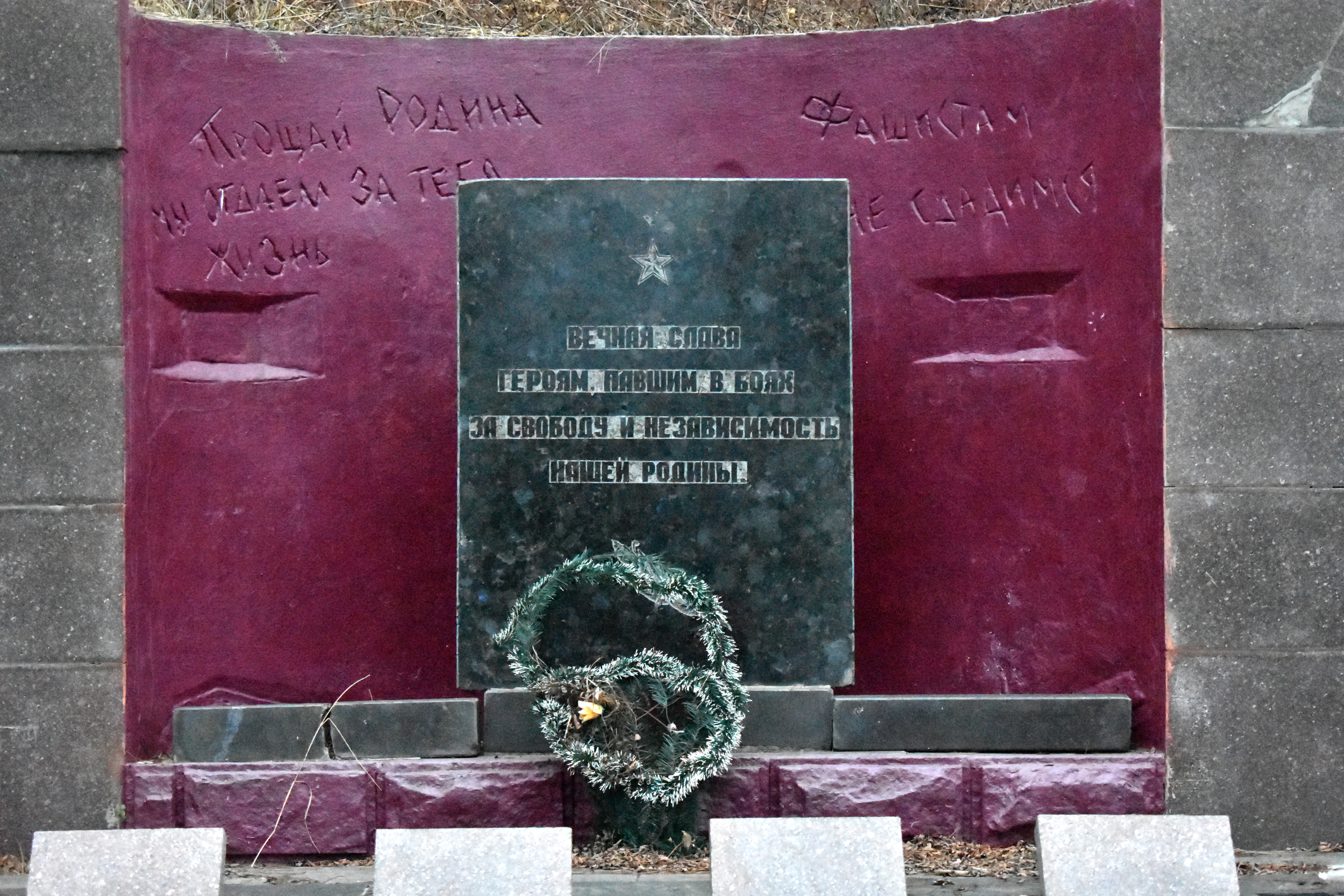 ДОТ 112 Лінія Сталіна, околиці м. Могилів-Подільський Вінницька область